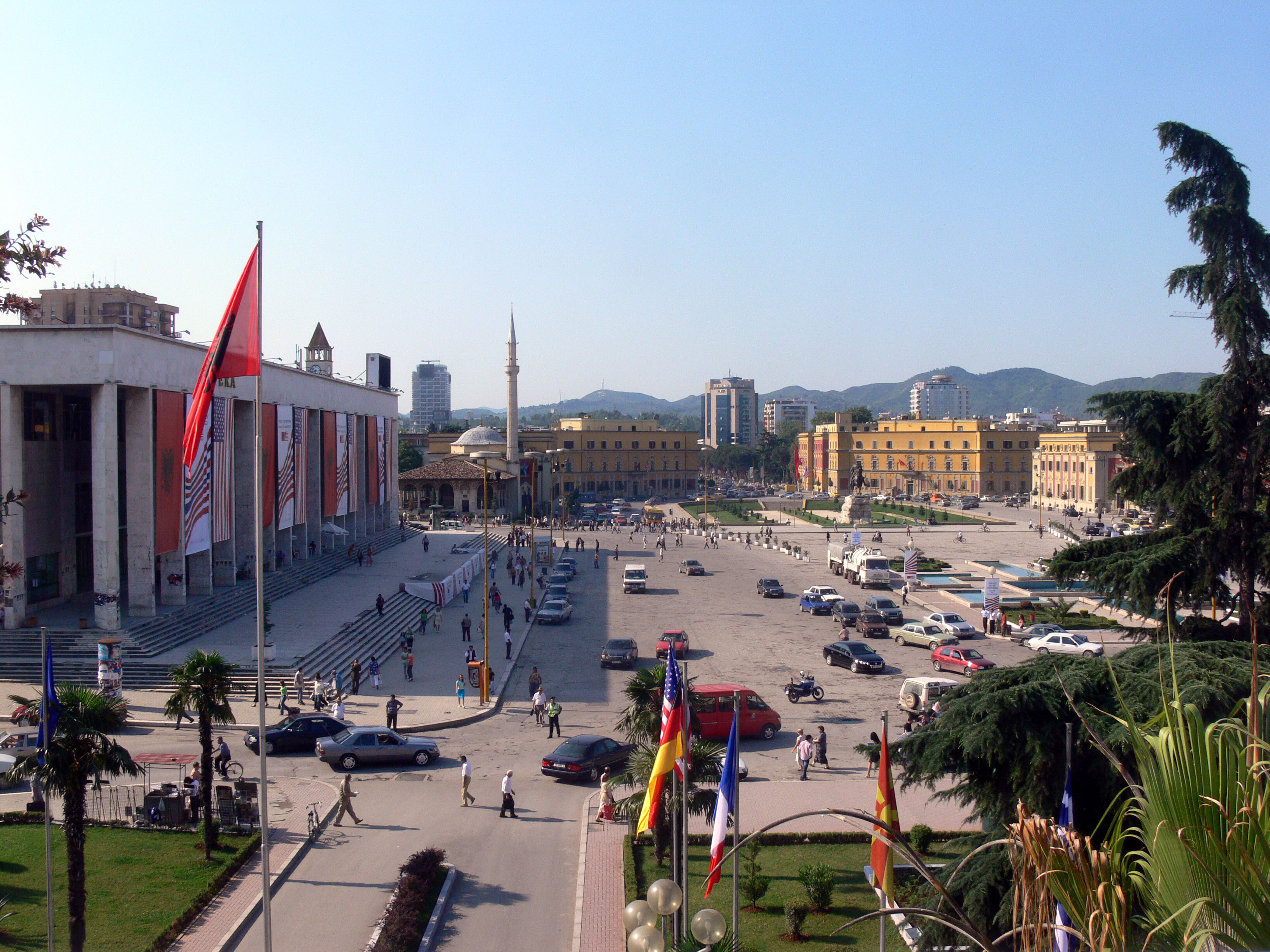 Tirana. Skanderbeg-Square (Sheshi Skenderbej) bei Nacht. Dekoration der Oper zum Bush-Besuch.